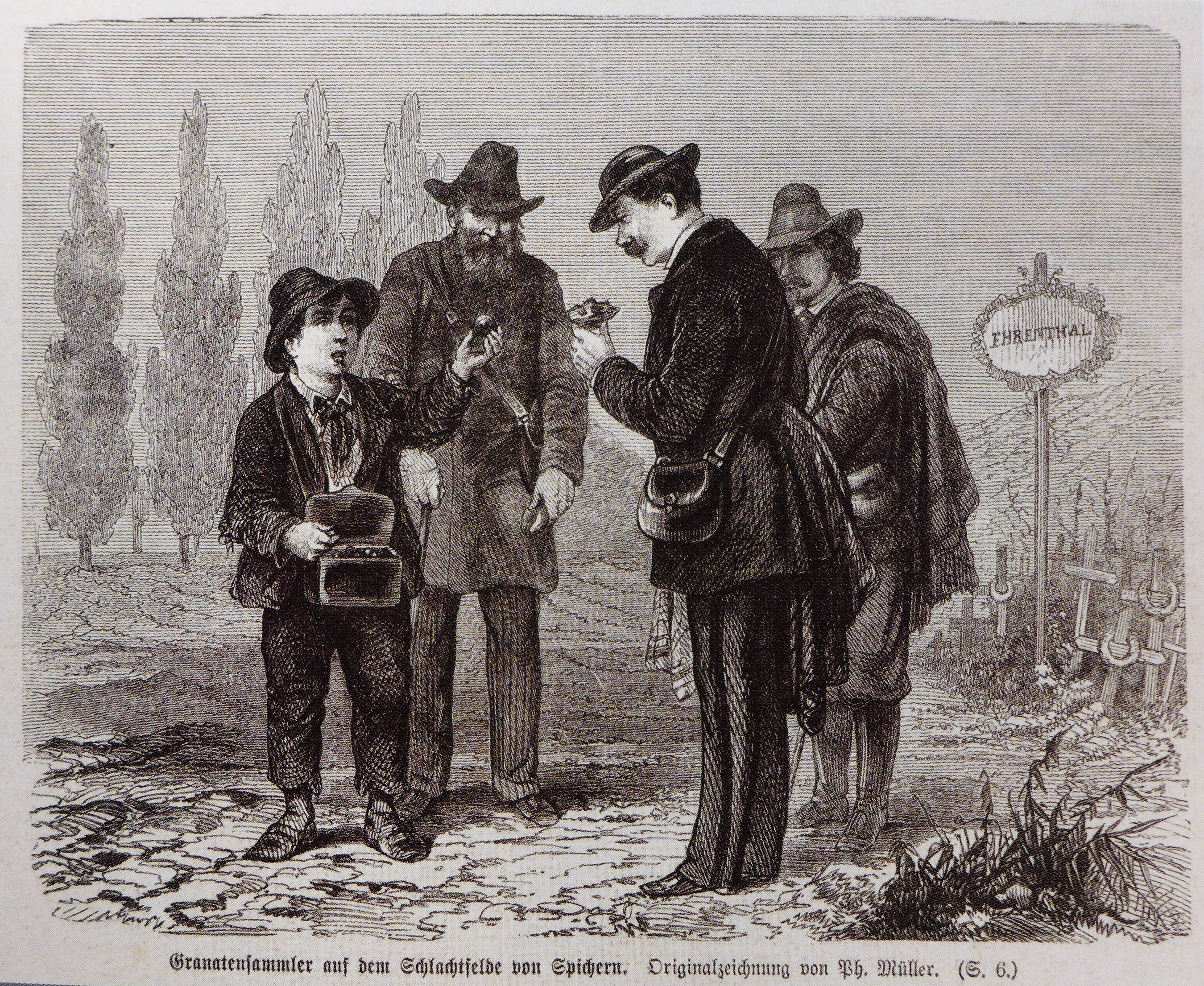 Philipp Müller: Granatensammler auf dem Schlachtfelde von Spichern (Archiv des Wehrgeschichtlichen Museums Rastatt)